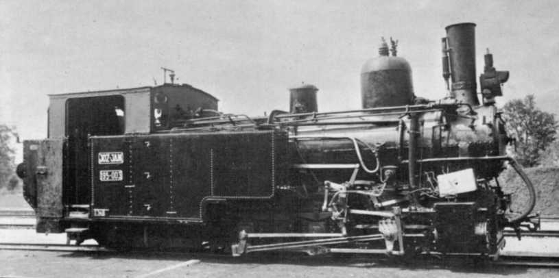 Schmalspurlokomotive JDŽ 195-003 der Jugoslawischen Staatsbahnen (JDŽ). Die Maschinen waren als Baureihe IIIb4 die ersten Zahnradlokomotiven der Bosnisch-Herzegowinischen Staatsbahnen (BHStB).